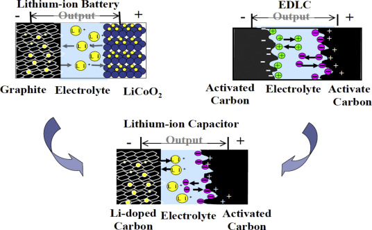 Ogólny schemat działania kondensatorów podwójnej warstwy elektrycznej, baterii litowo-jonowych oraz kondensatorów litowo-jonowych.